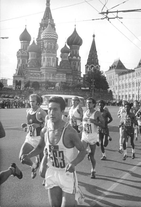 ADN-ZB Frotscher 1.8.80 Moskau: Olympia Das große Feld der Marathonläufer im Zentrum der Olympiastadt. Links der spätere Sieger Waldemar Cierpinski (DDR), der seinen Erfolg von 1976 in Montreal wiederholen konnte. Vorn Chun Son Kon aus der KDVR.